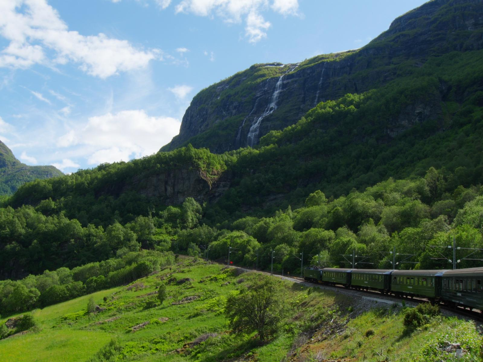 Flåmsbana ved Berekvam, utsyn oppover